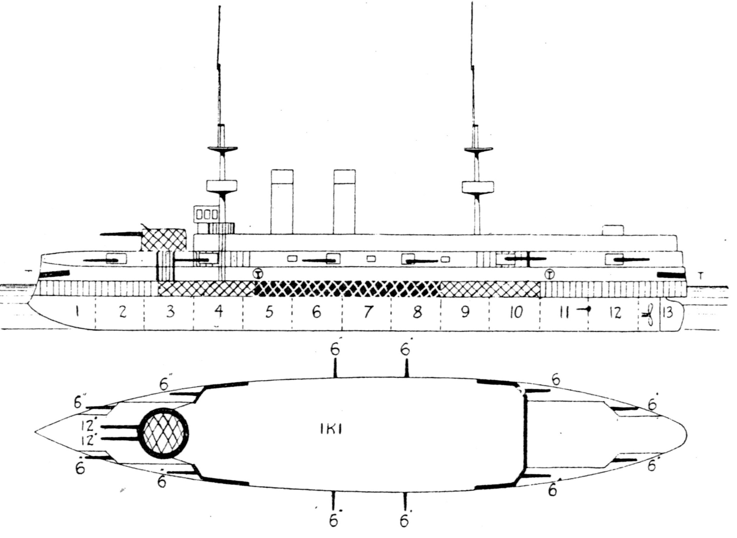 ロシア帝国海軍の戦艦インペラートル・ニコライ1世、のち大日本帝国海軍の戦艦壱岐